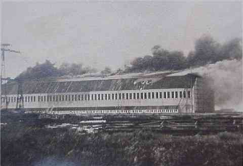 Toska brænder 19. juli 1918